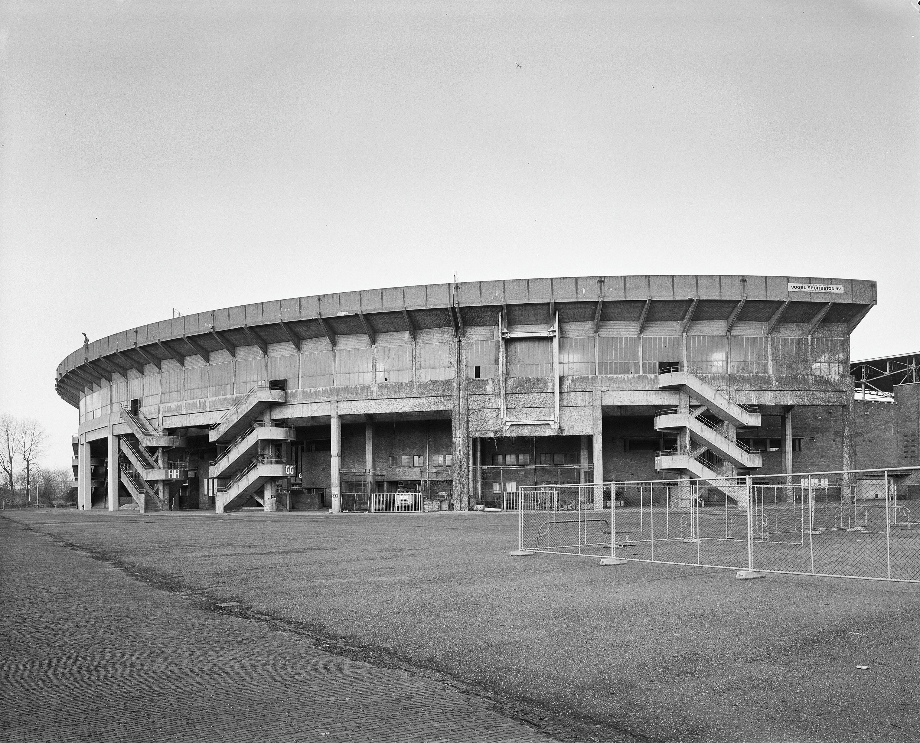 OLYMPISCH STADION: Exterieur OVERZICHT TRIBUNE, NOORDOOST ZIJDE